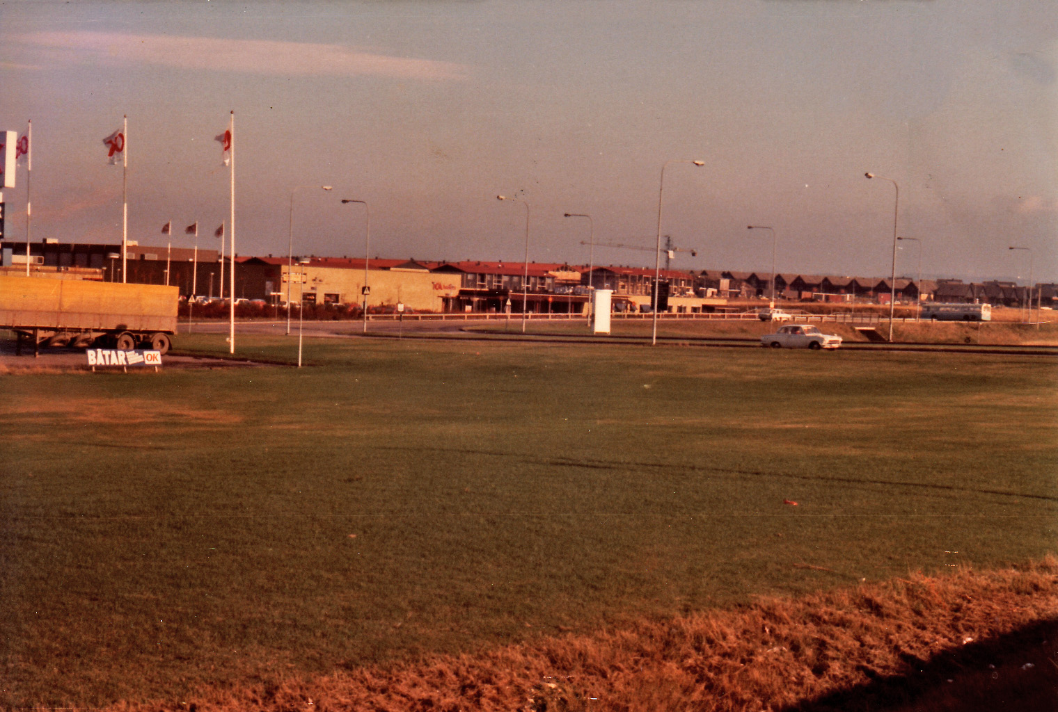 Vallås Centrum, Halmstad, fotograferat från Växjövägen 4 november 1976. Foto: Lars Gunnarsson